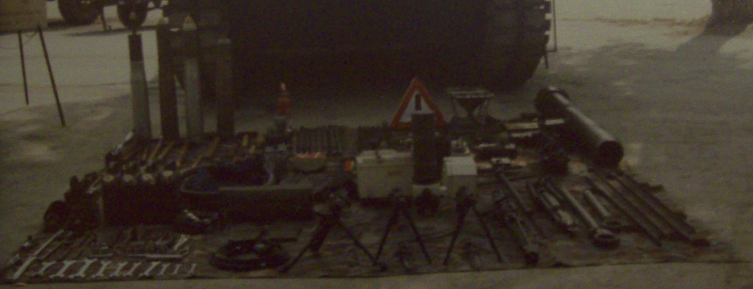 Dotazione Carro armato Leopard 1A1